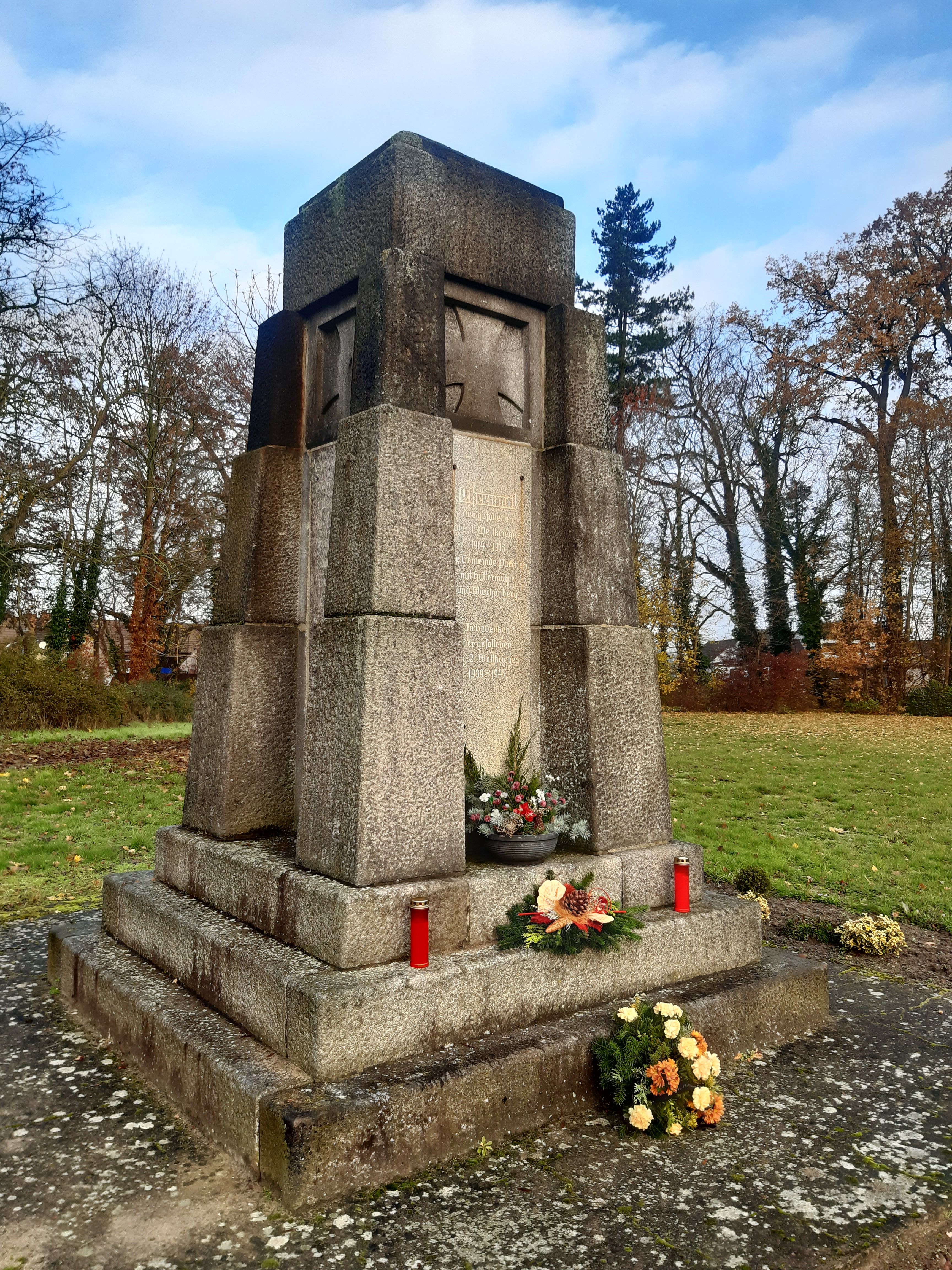 Kriegerdenkmal